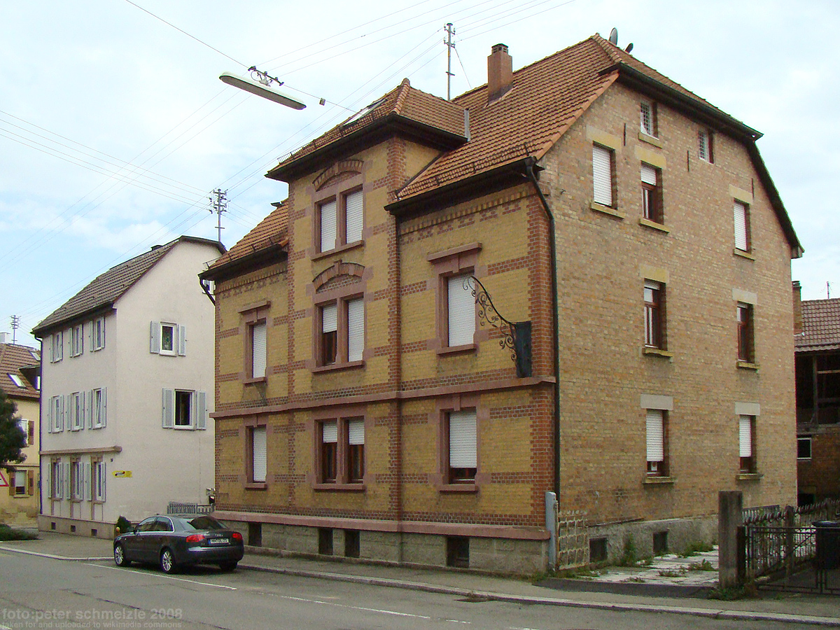 Denkmalgeschützte Gebäude Klingenberger Straße 139 in Heilbronn-Böckingen